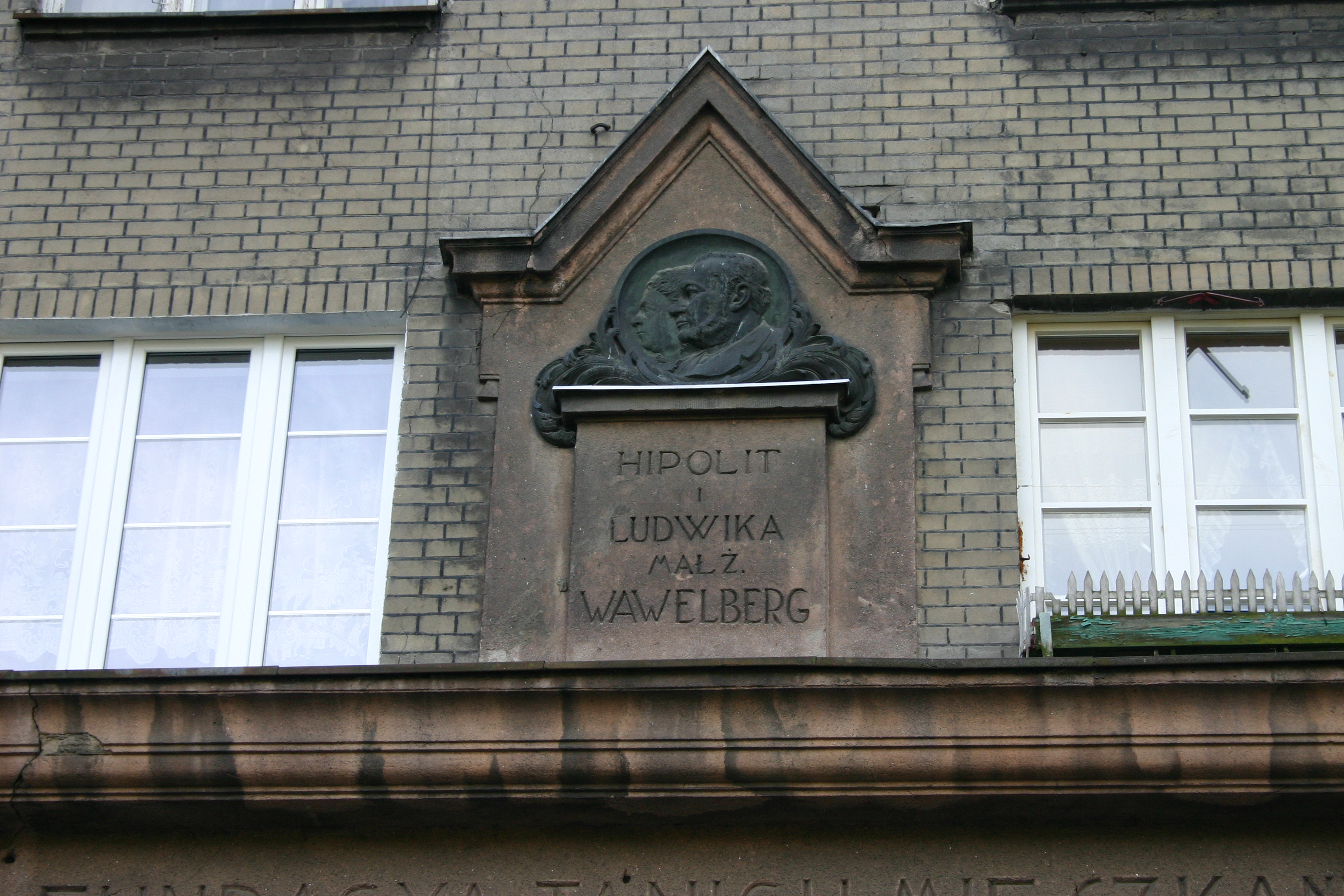 Medalion Ludwiki i Hipolita Wawelbergów; Dom Fundacji Wawelbergów, 1927-29 Warszawa, ul. Ludwiki 1, Wola